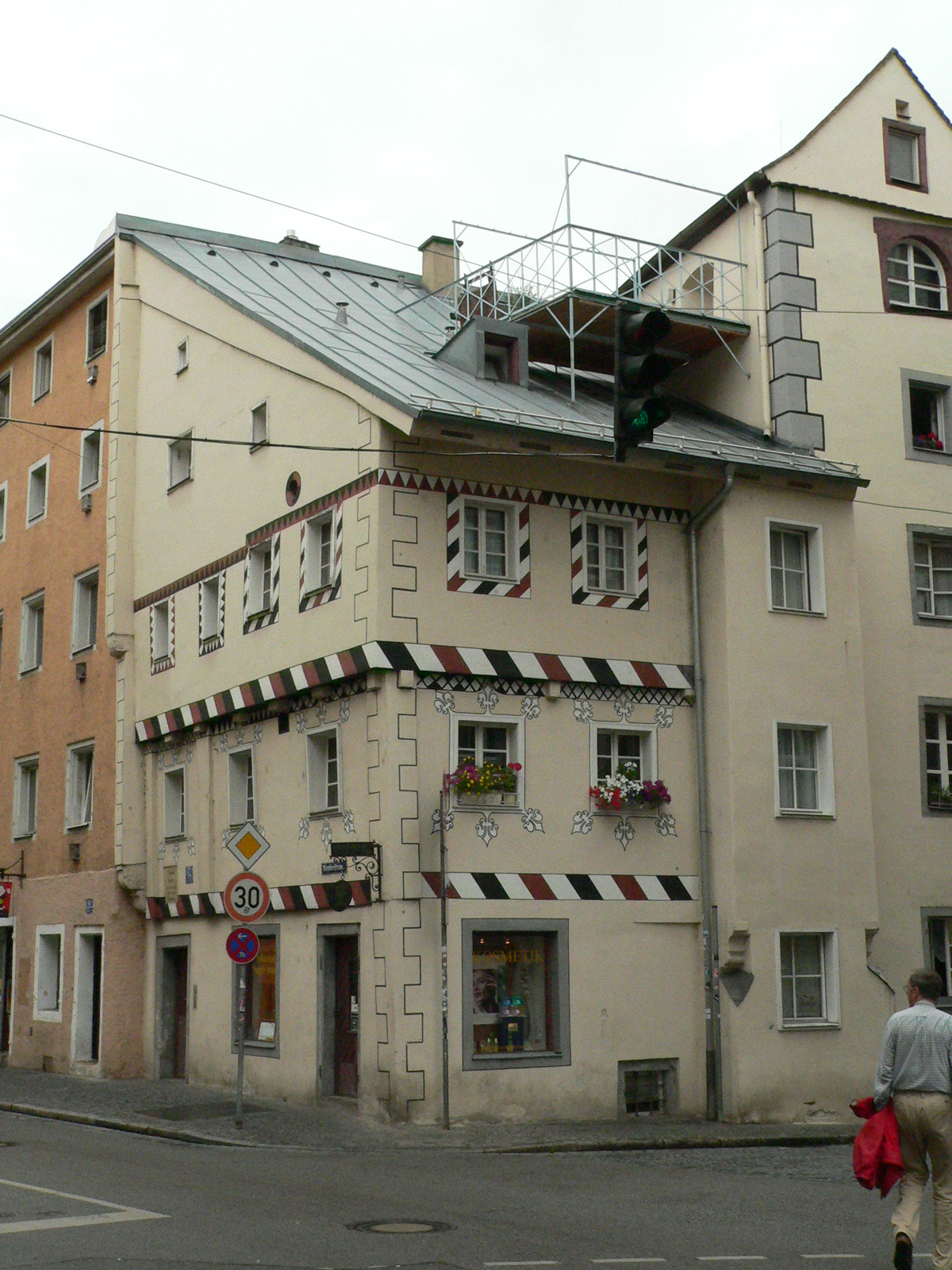 Kepler egykori lakóháza Regensburgban